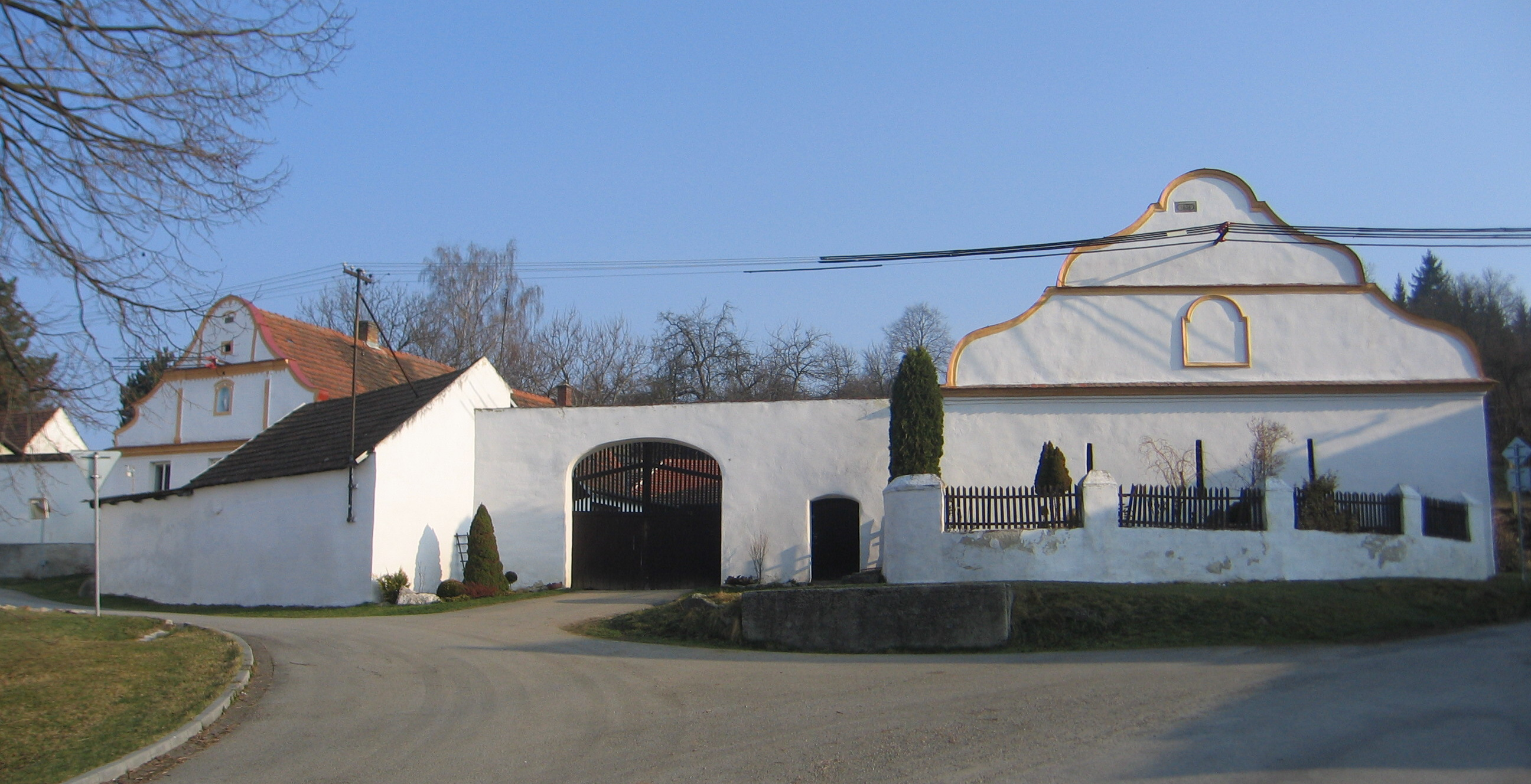 Venkovská usedlost (Přechovice), Přechovice 13